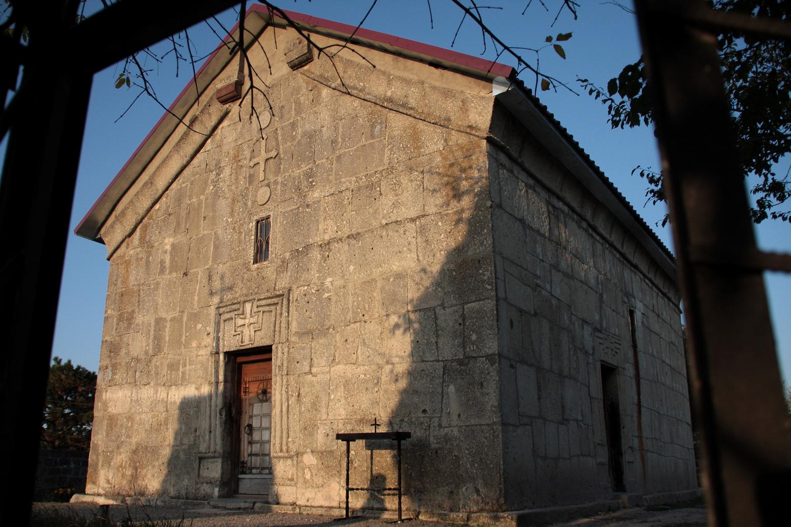 ხაშური, გორათის ეკლესია